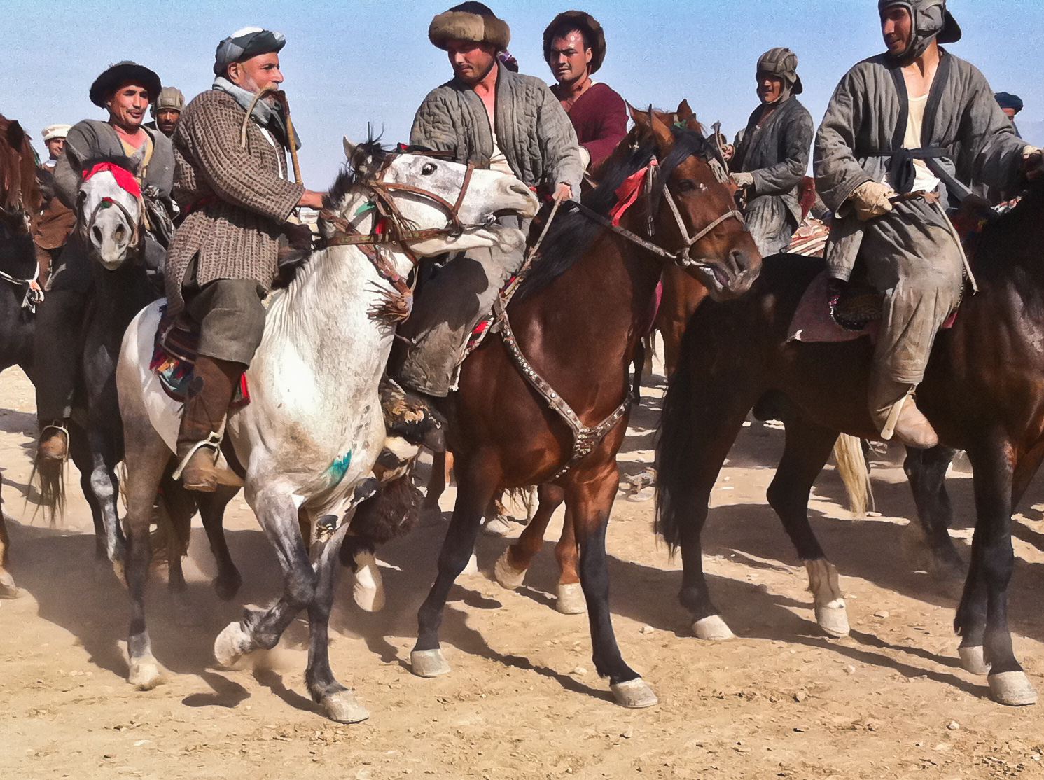 Nowruz Buzkashi Match in Mazar